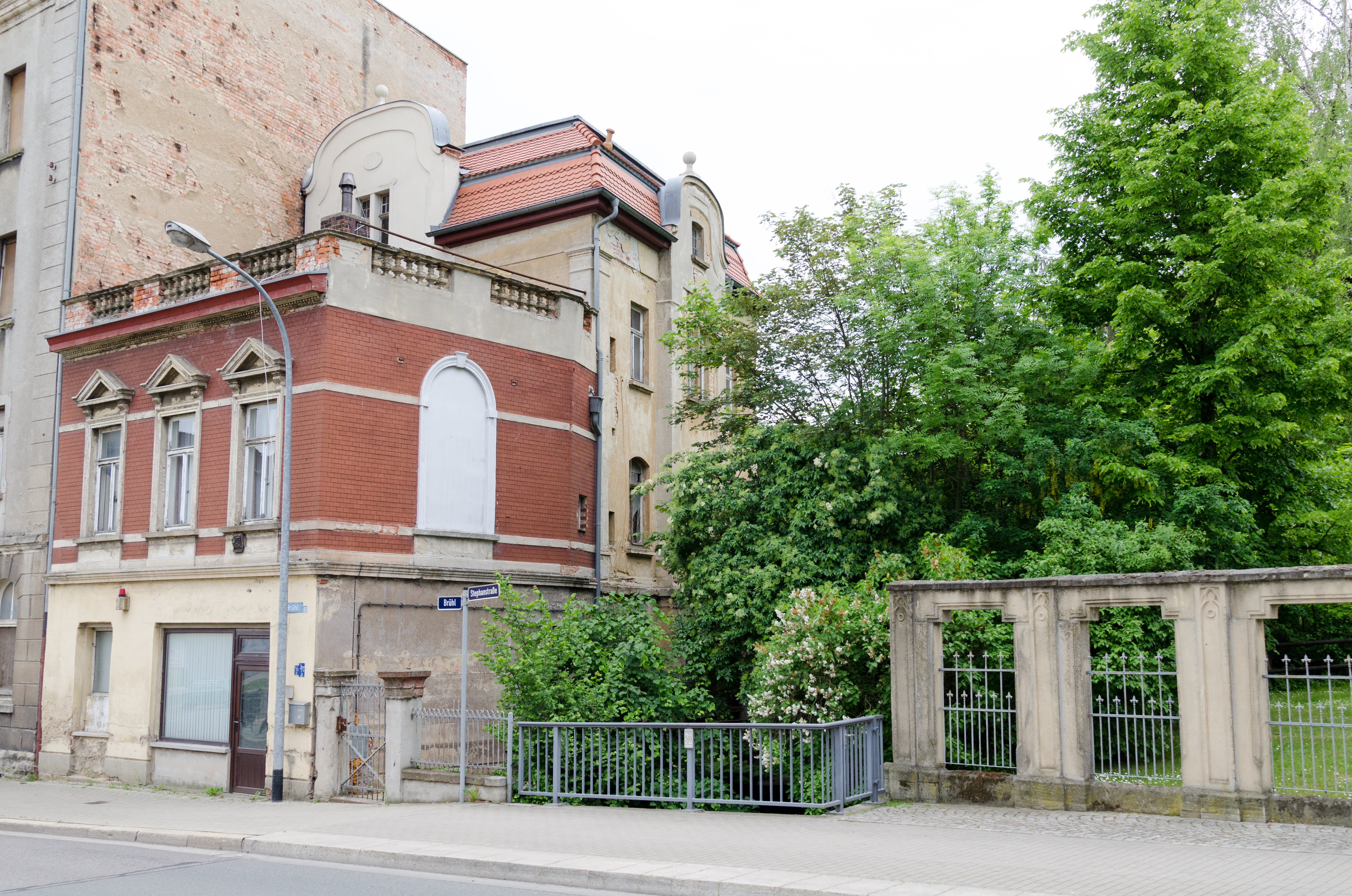 Zeitz, Brühl 17